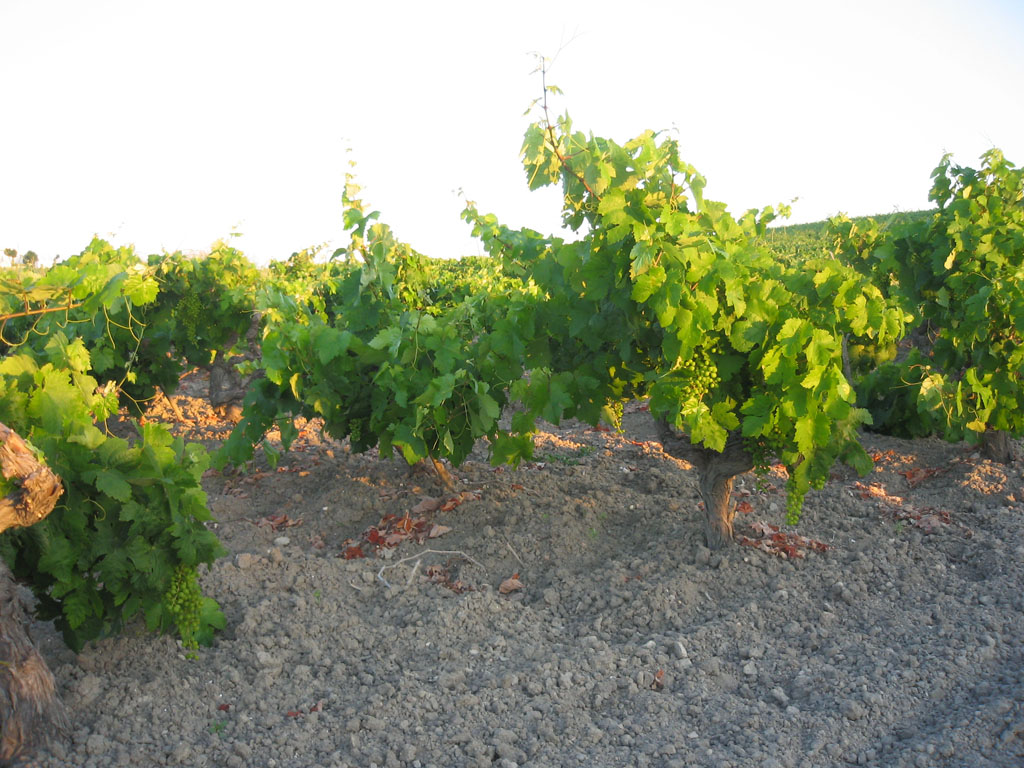 Viña en el pago de El Carrascal, en Sanlúcar de Barrameda